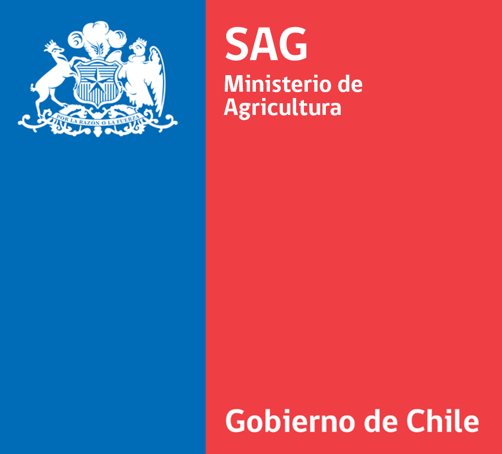 Logo Institucional del Servicio Agrícola y Ganadero.